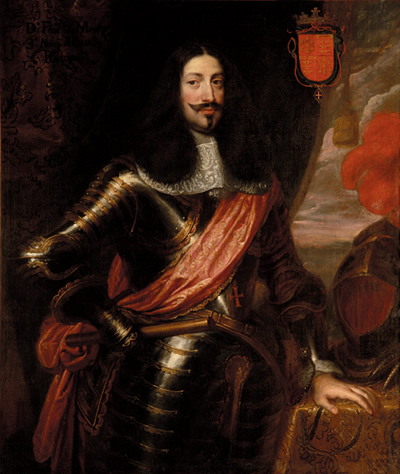 Francisco de Moura Corterreal y Melo (1610-1675), III marqués de Castel Rodrigo, noble portugués al servicio de Felipe IV de España.